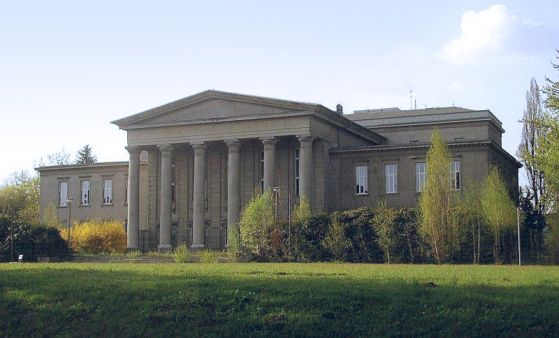 Kulturhaus der Wismut in Chemnitz-Rabenstein